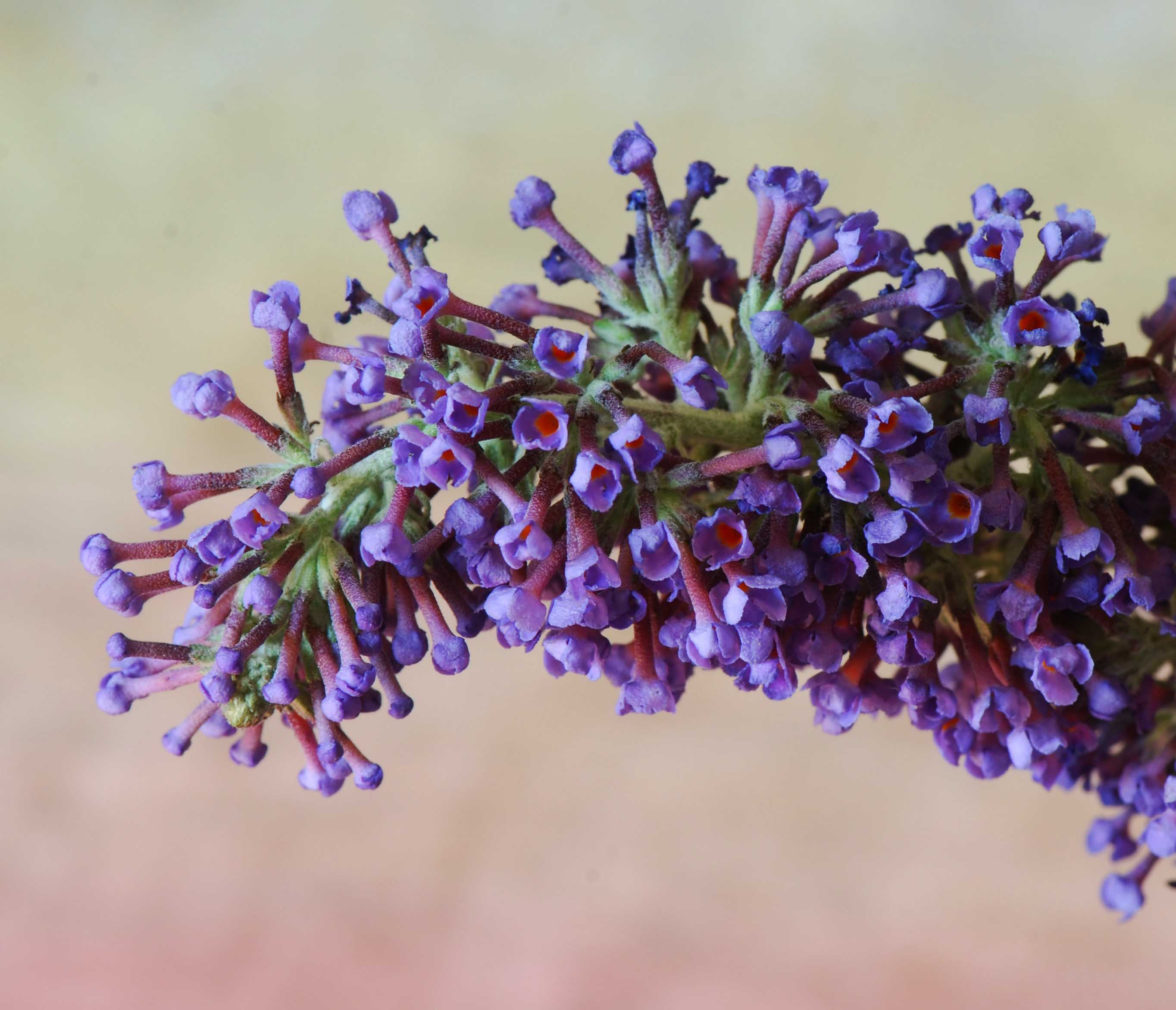 Buddleia davidii, fleurs